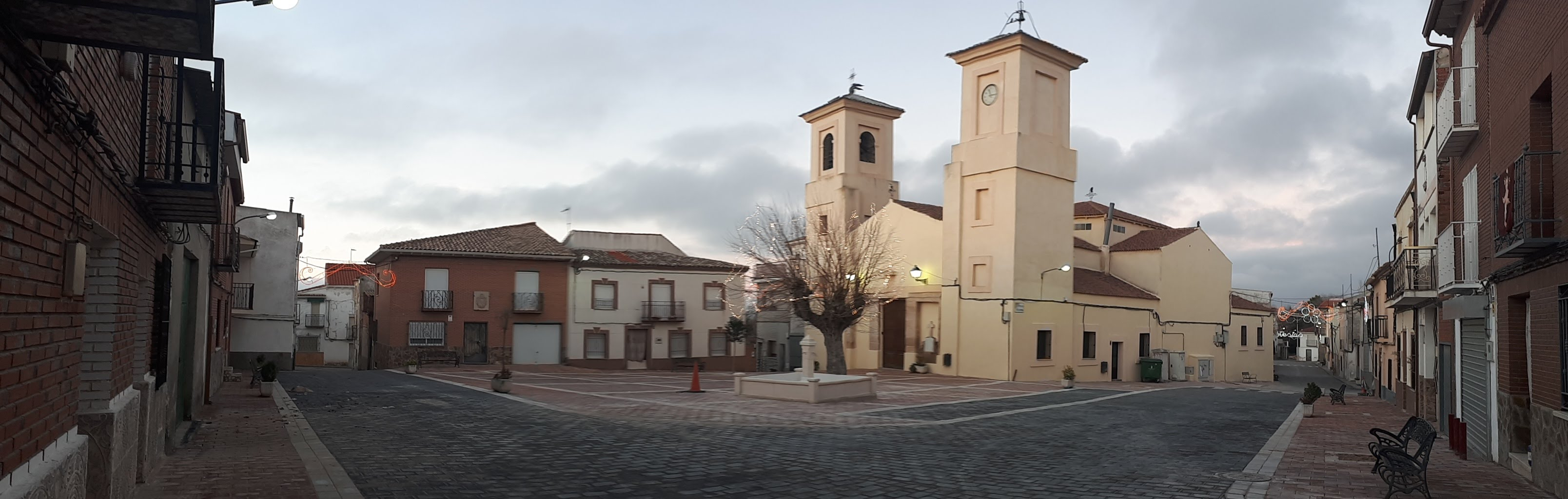 Plaza Mayor arreglada de Zarza de Tajo